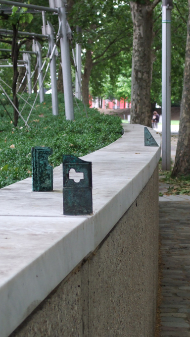 Sculpture de visée_3_Grp_Parc de la Villette